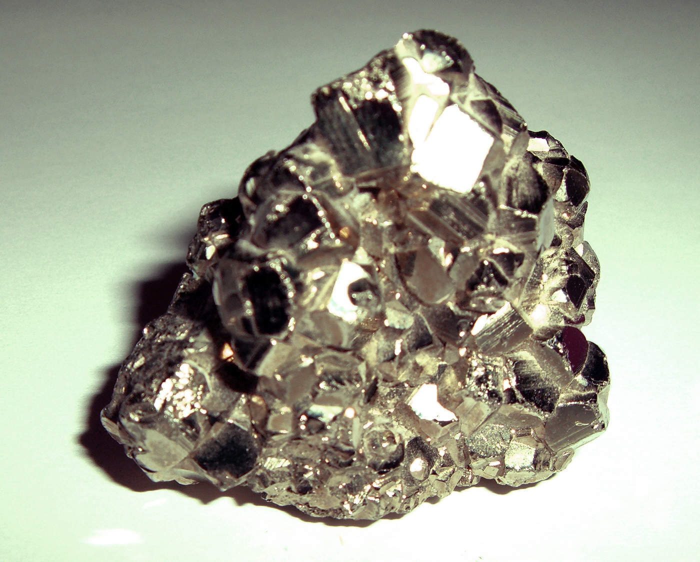 Pyrit aus Peru